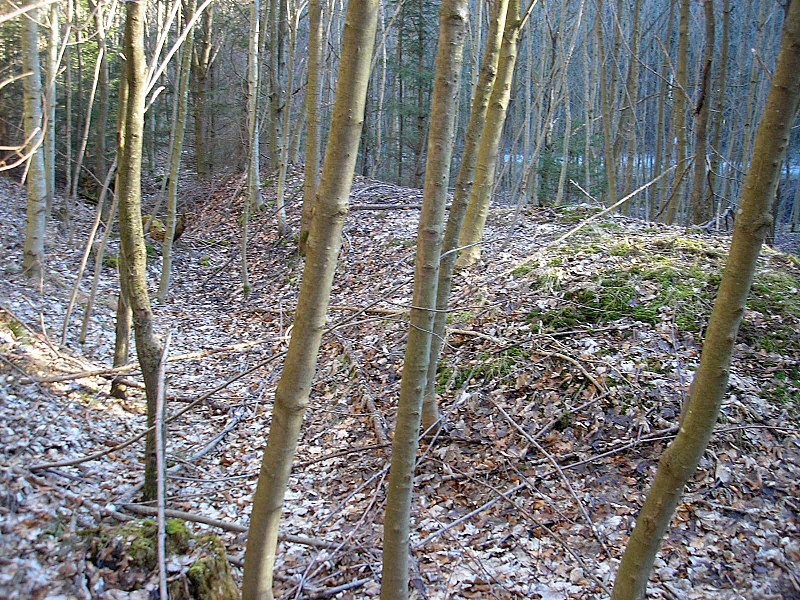 Burgstall "im Viehtrieb" bei Straßberg (Stadt Bobingen, Landkreis Augsburg, Bayerisch-Schwaben). Der südliche Wallgraben. Blick nach Osten. Eigene Aufnahme, Feb. 2008 / Former castle or hill fort "im Viehtrieb" near Straßberg (Bobingen near Augsburg, Bavaria, Germany). Looking east into the southern moat. Own photo, Feb. 2008